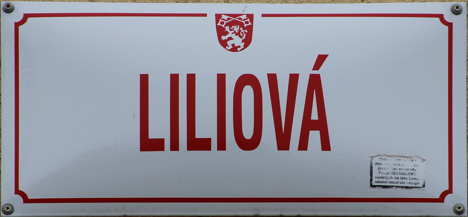 Prachatice